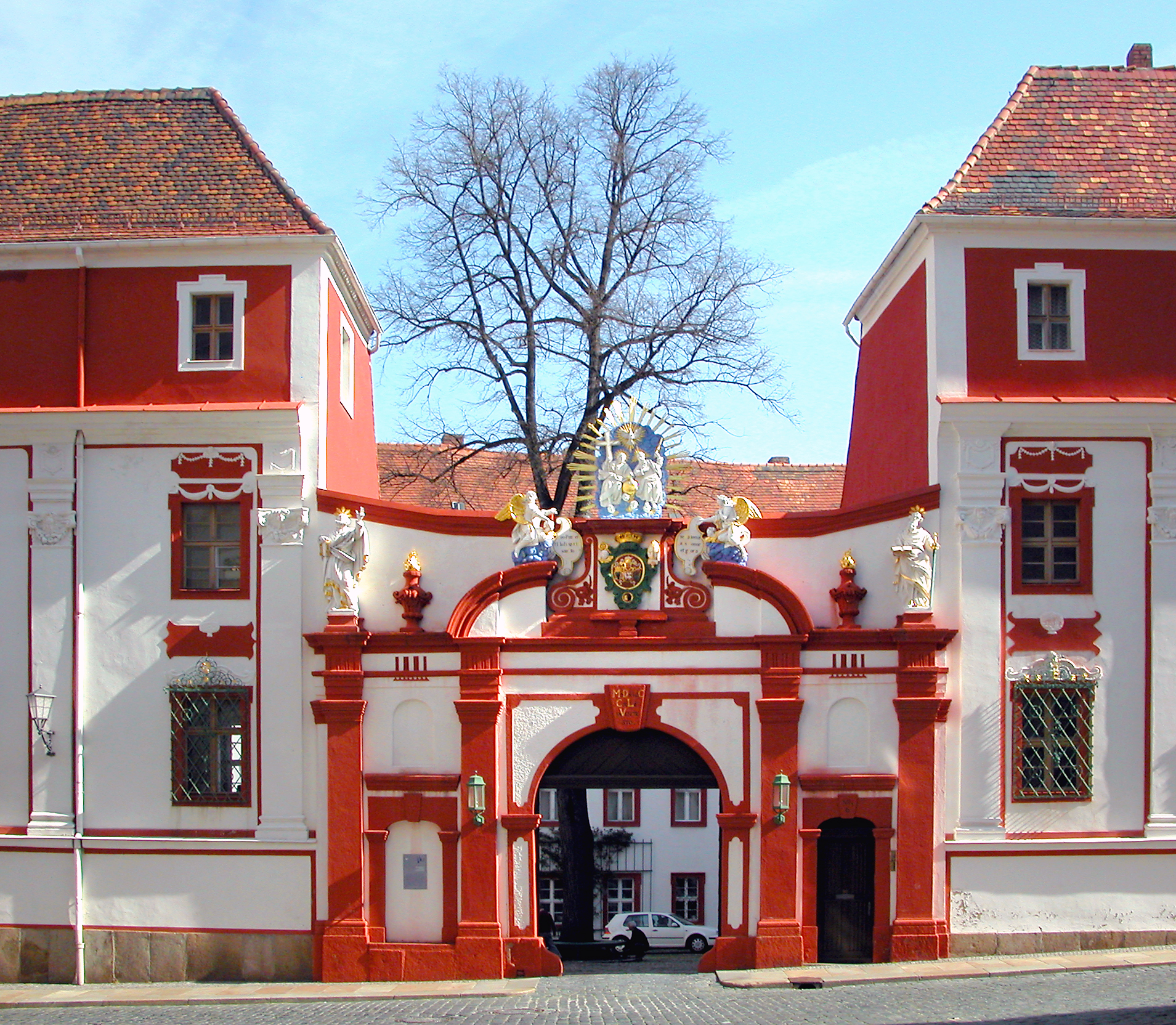 28.04.2008 02625 Bautzen, An der Petrikirche: Domstift, seit dem Mittelalter Sitz des Bischofs von Meißen bis zur Reformation. Das Hauptportal von 1755. (GMP: 51.182928,14.423322) [DSCN32478.TIF]20080428150DR.JPG(c)Blobelt